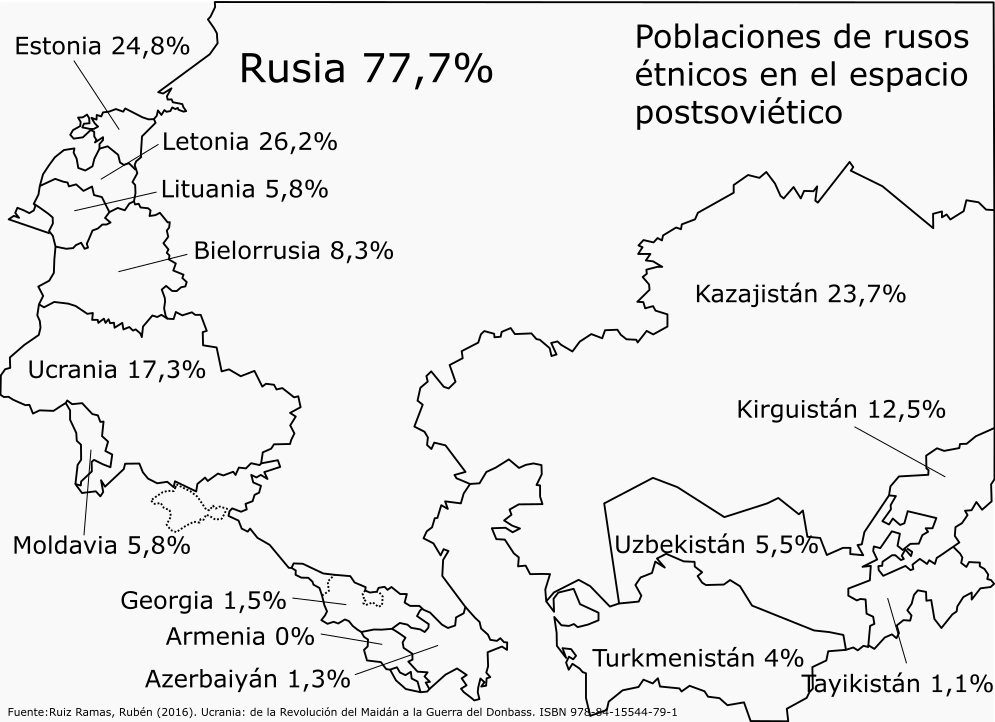 Fuenteː Ruiz Ramas, Rubén; (2016). Ucrania: de la Revolución del Maidán a la Guerra del Donbass. ISBN 978-84-15544-79-1